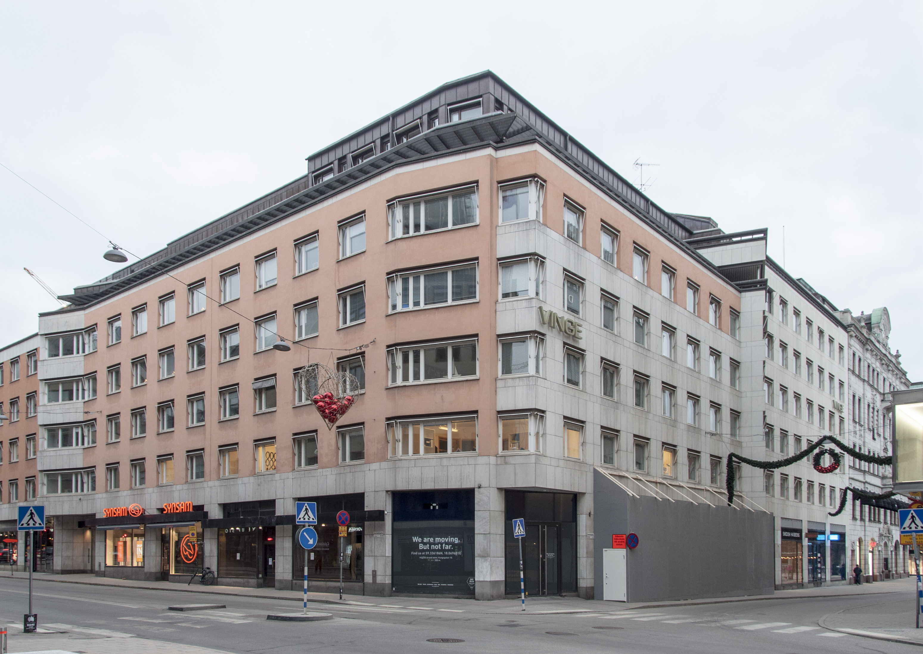 Skären 9, Norrlandsgatan 8-10, Smålandsgatan 18-20 Stockholm. Nybyggnadsår 1982 - 1984 Fastighetsaktiebolaget Hufvudstaden (Byggherre) Jacobson & Widmark AB (Arkitektkontor) Uhlin & Malm Arkitektkontor AB (Arkitektkontor)